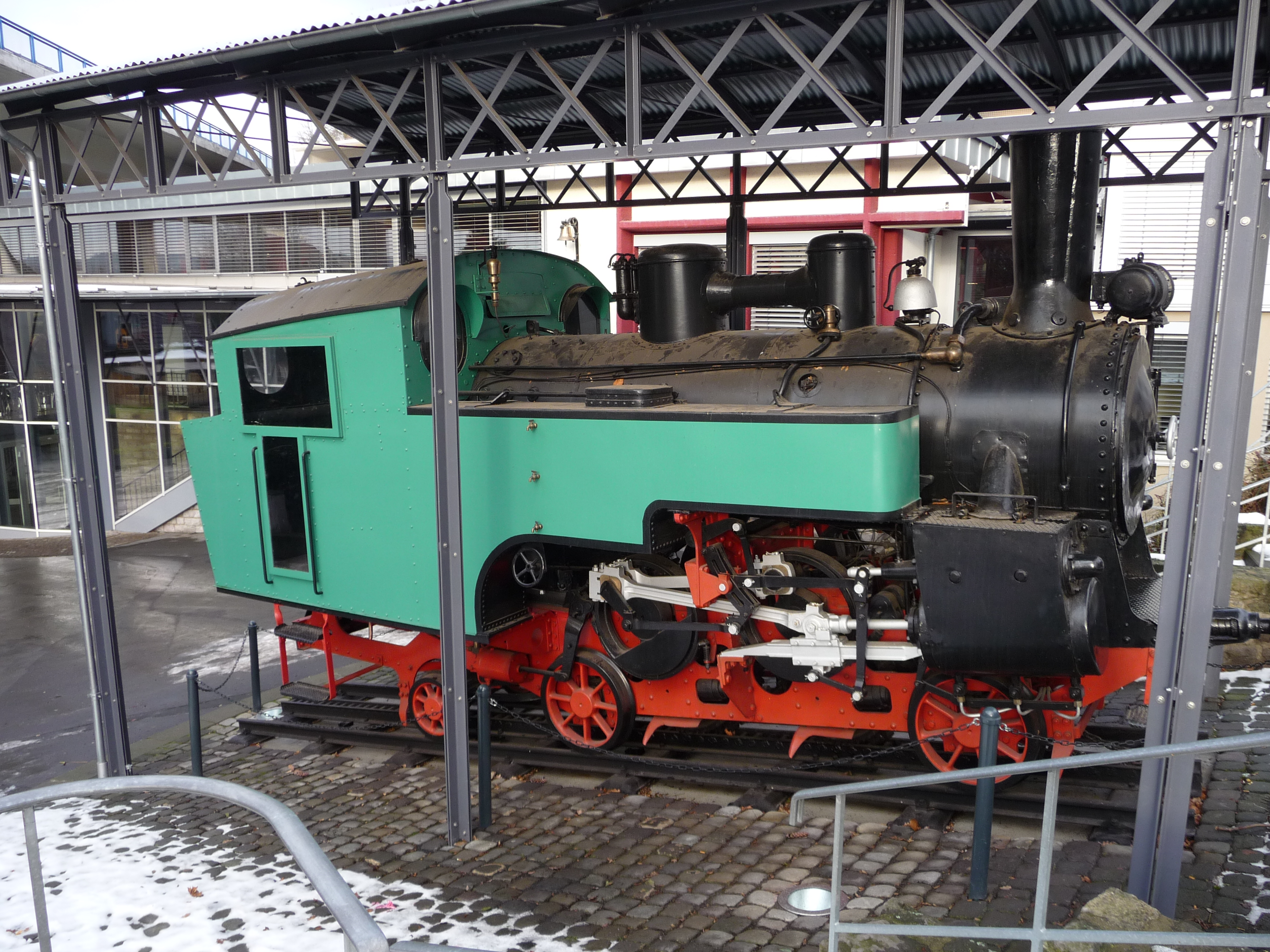 Drachenfelsbahn